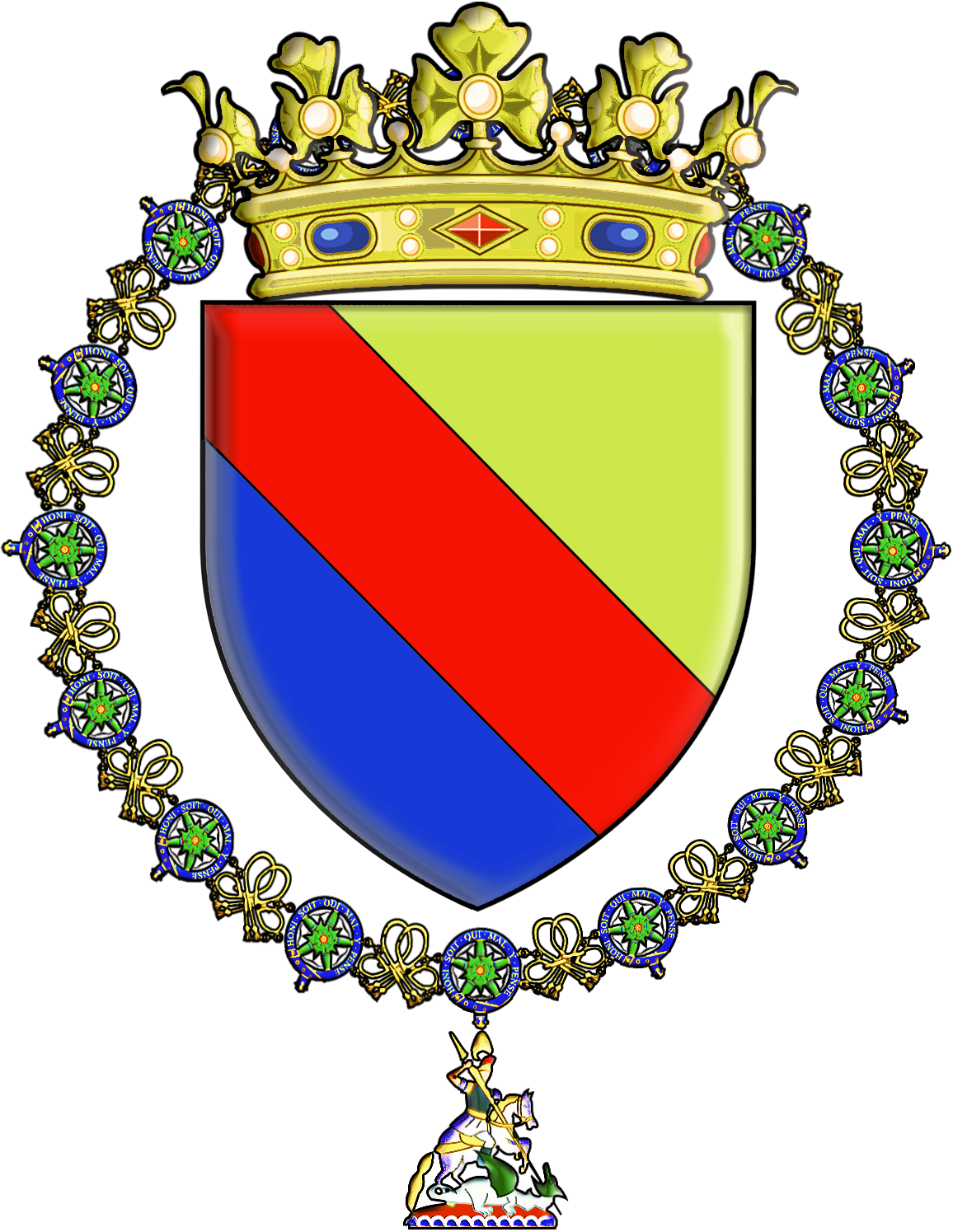 Armes d'Antonin-Nompar de Caumont, 1er duc de Lauzun